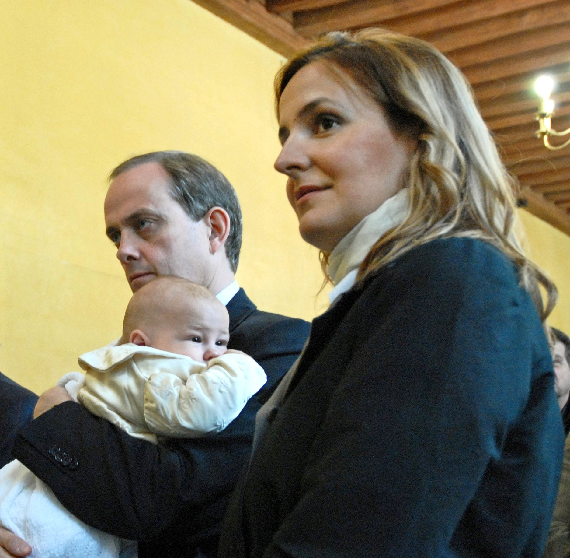 Son Altesse Royale, le prince Jean d’Orléans, duc de Vendôme, Dauphin de France, avec son fils SAR le Prince Gaston de France et son épouse, née Philomena de Tornos y Steinhart, lors du lancement du site web sur Henri IV